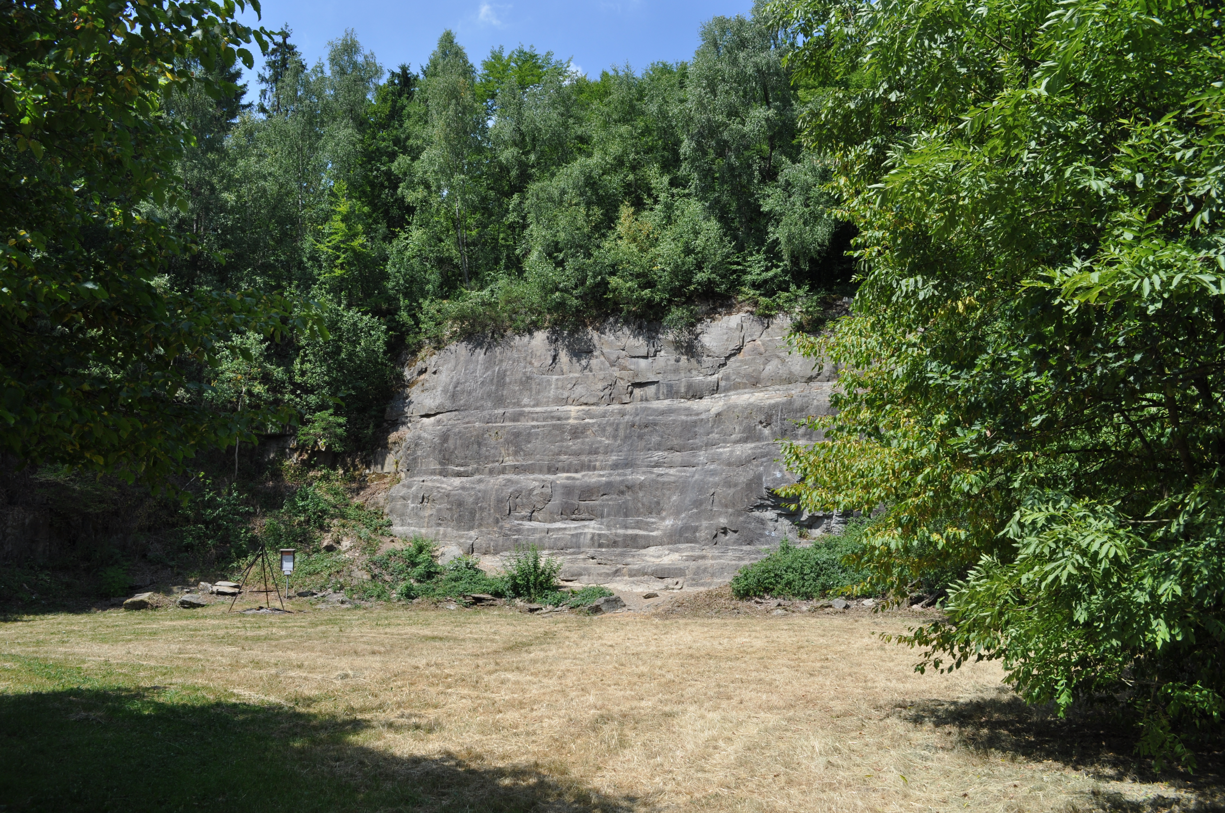 Ehemaliger Steinbruch in Cratzenbach. Heute Klettergarten Cratzenbach des Deutschen Alpenvereins und des Naturparks Hochtaunus und Grillplatz.